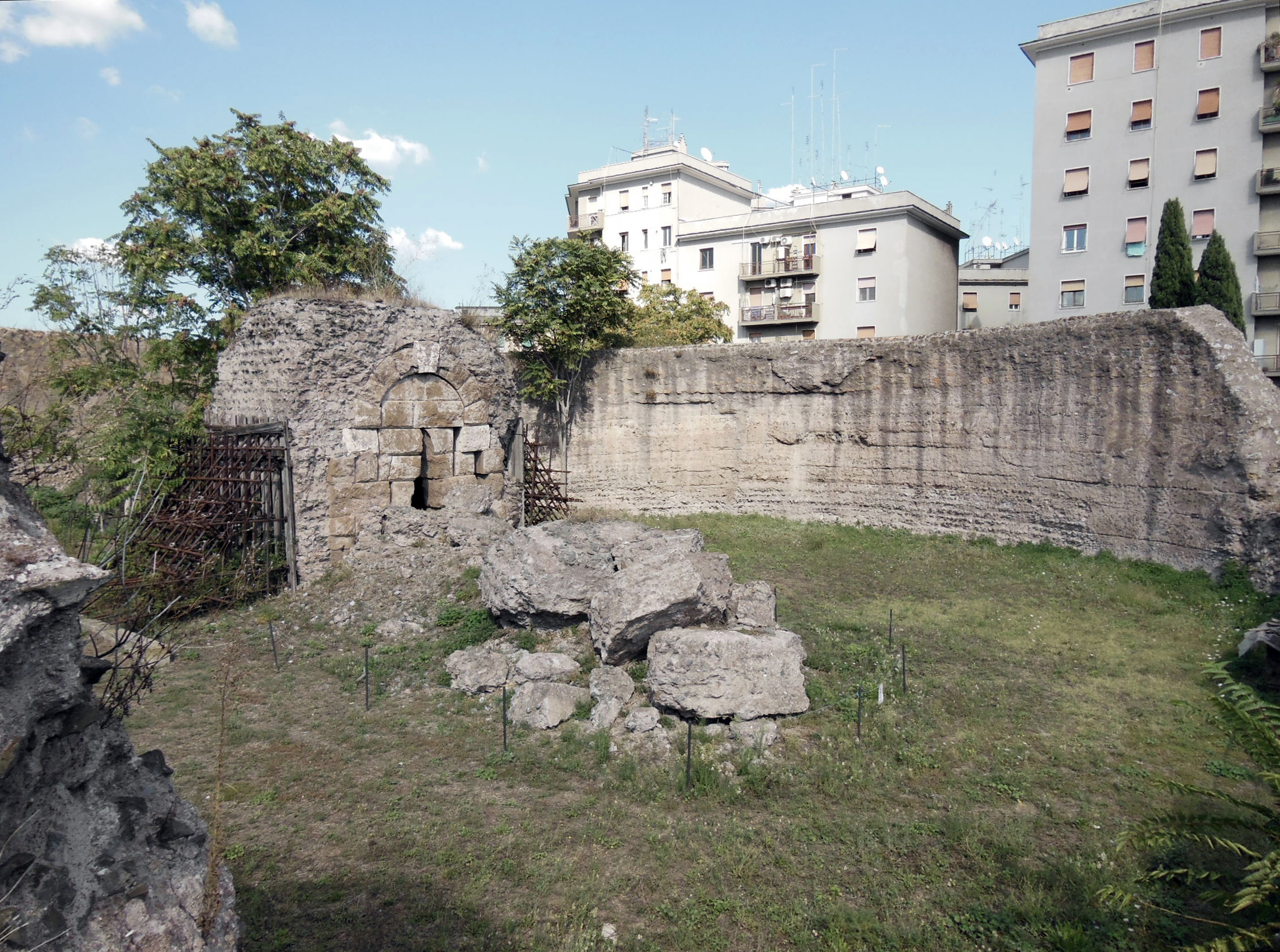 Mausoleo del Torrione Prenestino, interno, dal terrazzino accessibile dal parco This is a photo of a monument which is part of cultural heritage of Italy.